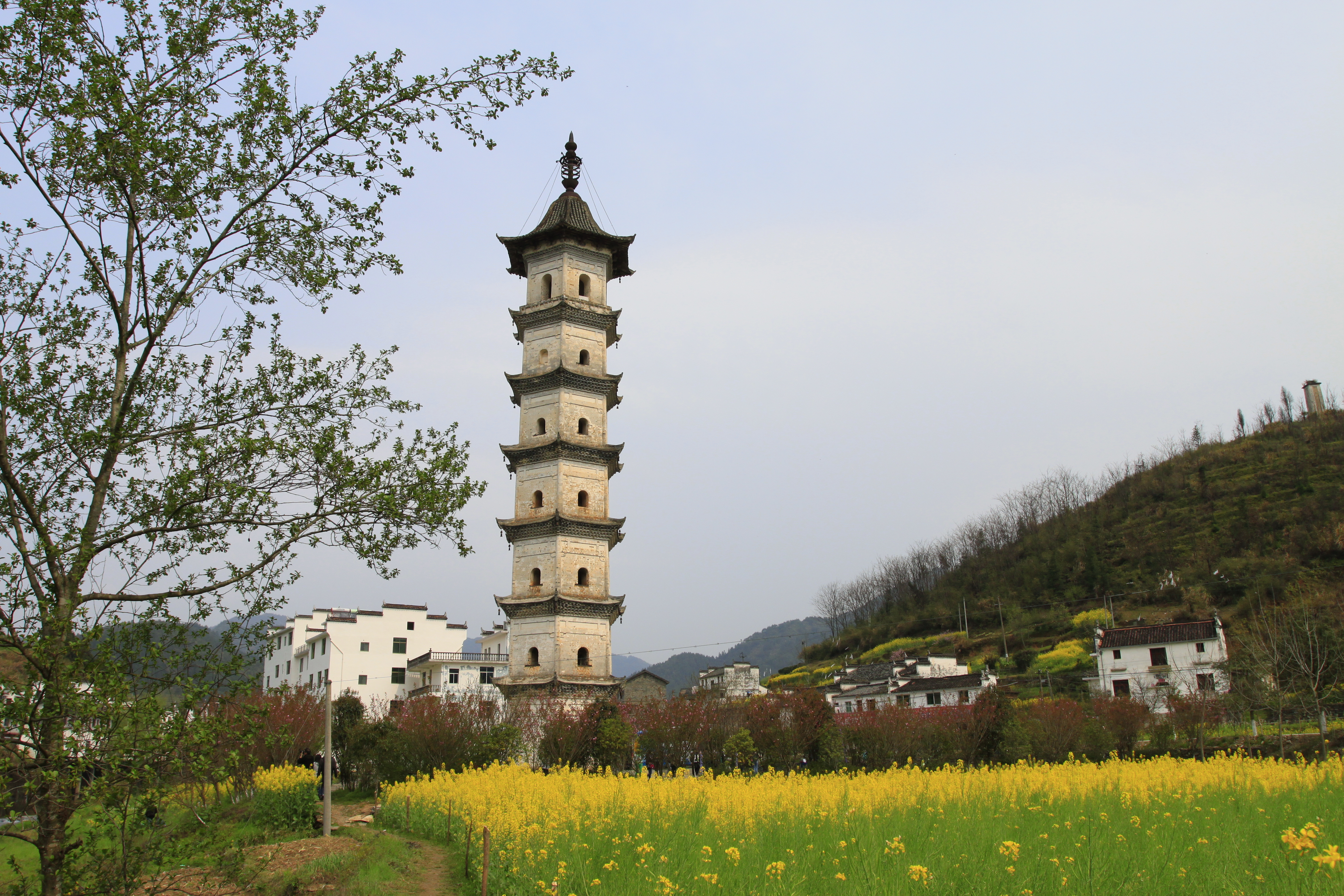 龙天塔，位于中国江西省婺源县浙源乡凤山村。